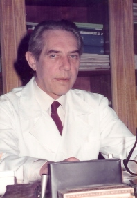 Josef Schrudde - Portrait